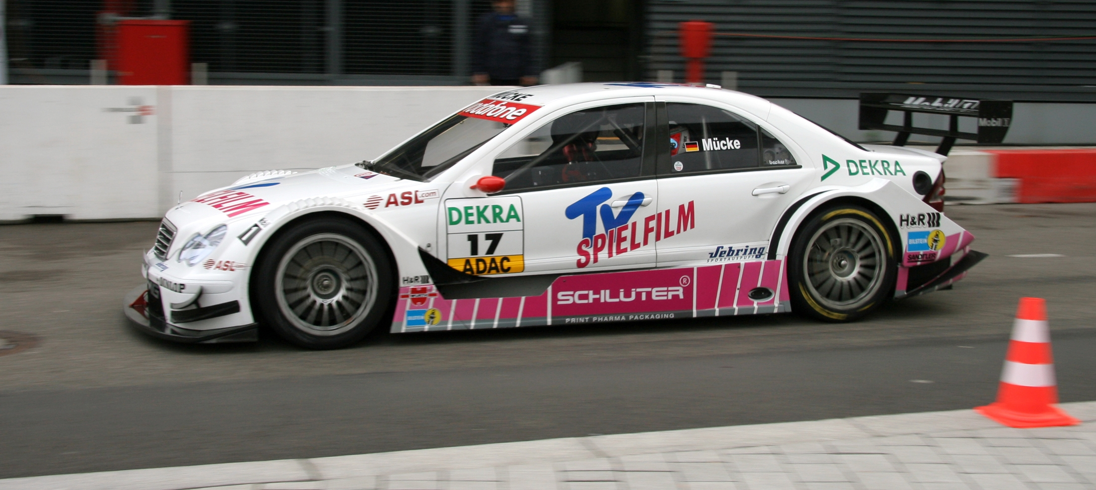 DTM car Mercedes-Benz AMG (C-Class, W203), Stefan Mücke (driver)